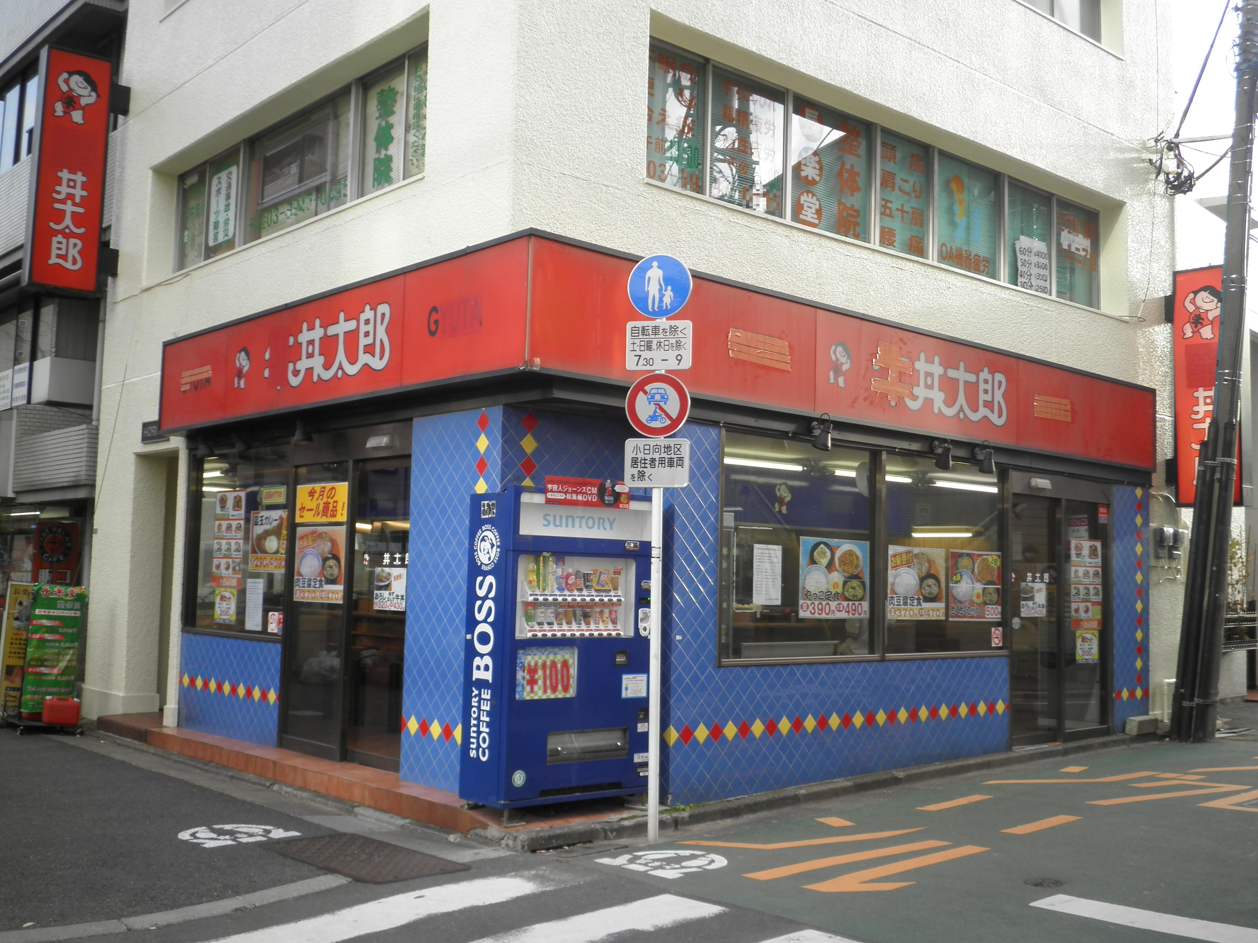 どんぶり太郎茗荷谷店（東京都文京区小日向）。2013年（平成25年）1月3日来店時に撮影。看板の「牛丼太郎」の「牛」、及び「GYUTA」の文字が赤いテープで隠されているのが確認できる。すぐ近隣には松屋茗荷谷店となか卯茗荷谷店が所在する。